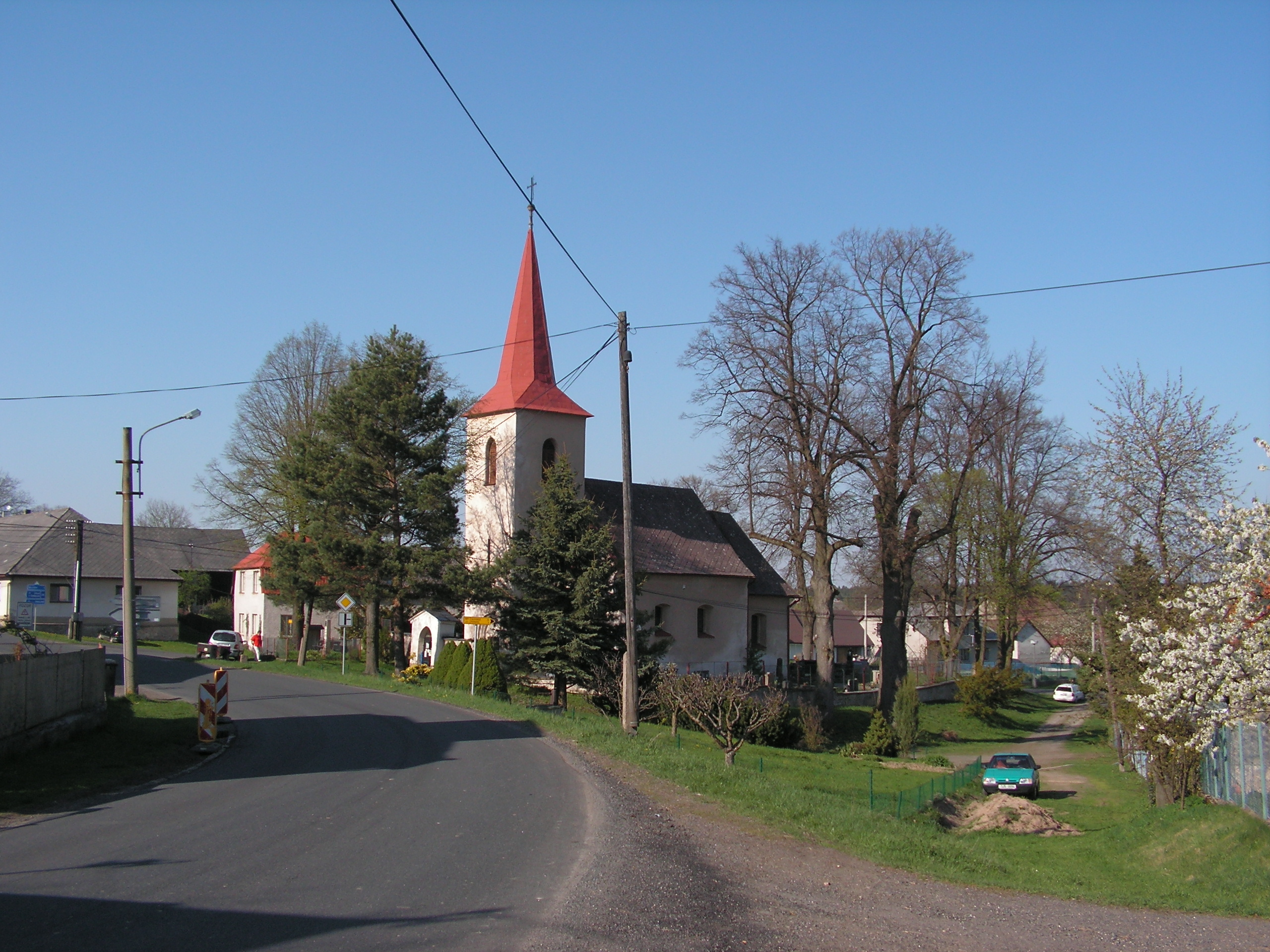 Obec Třebětín v okrese Kutná Hora.